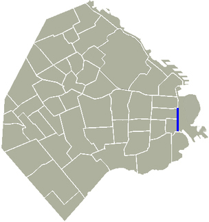 Avenida Ing. Huergo